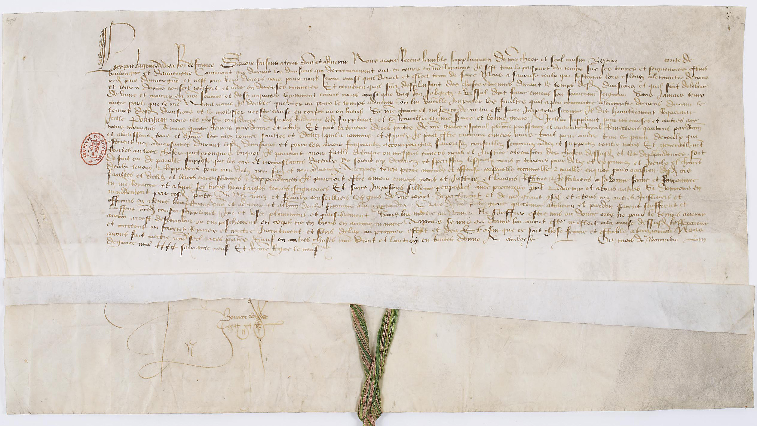 Louis XI, roi de France, rédige en novembre 1469 des lettres de grâce en faveur de Bertrand de la Tour, comte de Boulogne et d'Auvergne.